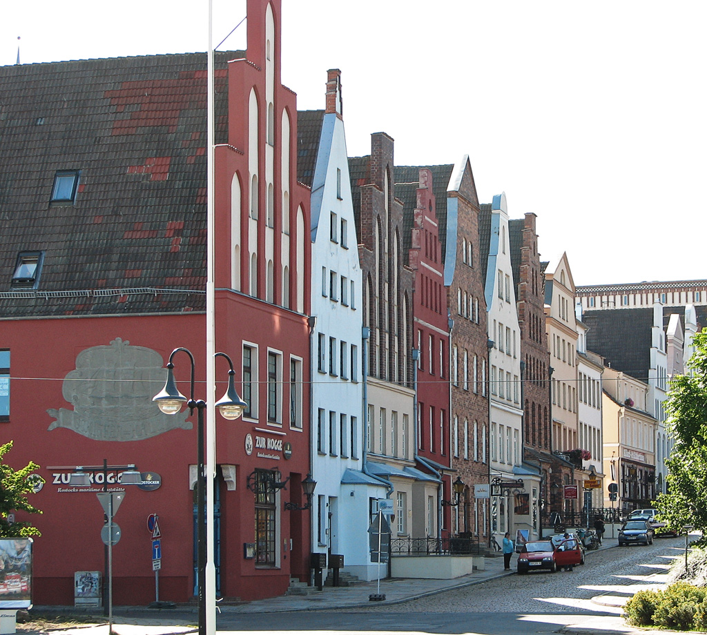 Beschreibung: Giebelhäuser in der nördlichen Altstadt / Zur Kogge / Hausbaumhaus ... in Rostock / Germany Fotograf: Darkone, 17. August 2005